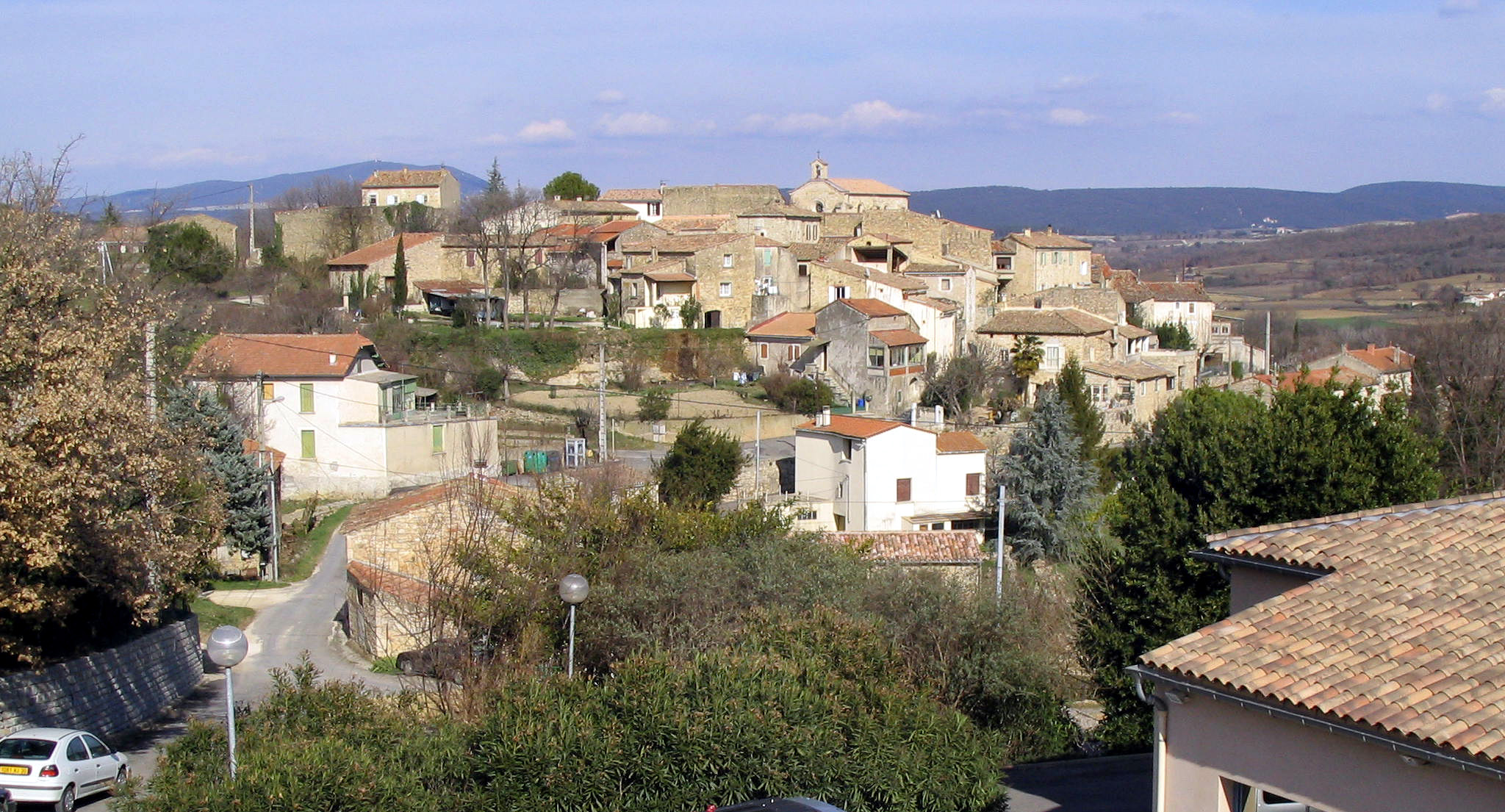 Village de Martignargues vue de l'entrée côté Vézénobres